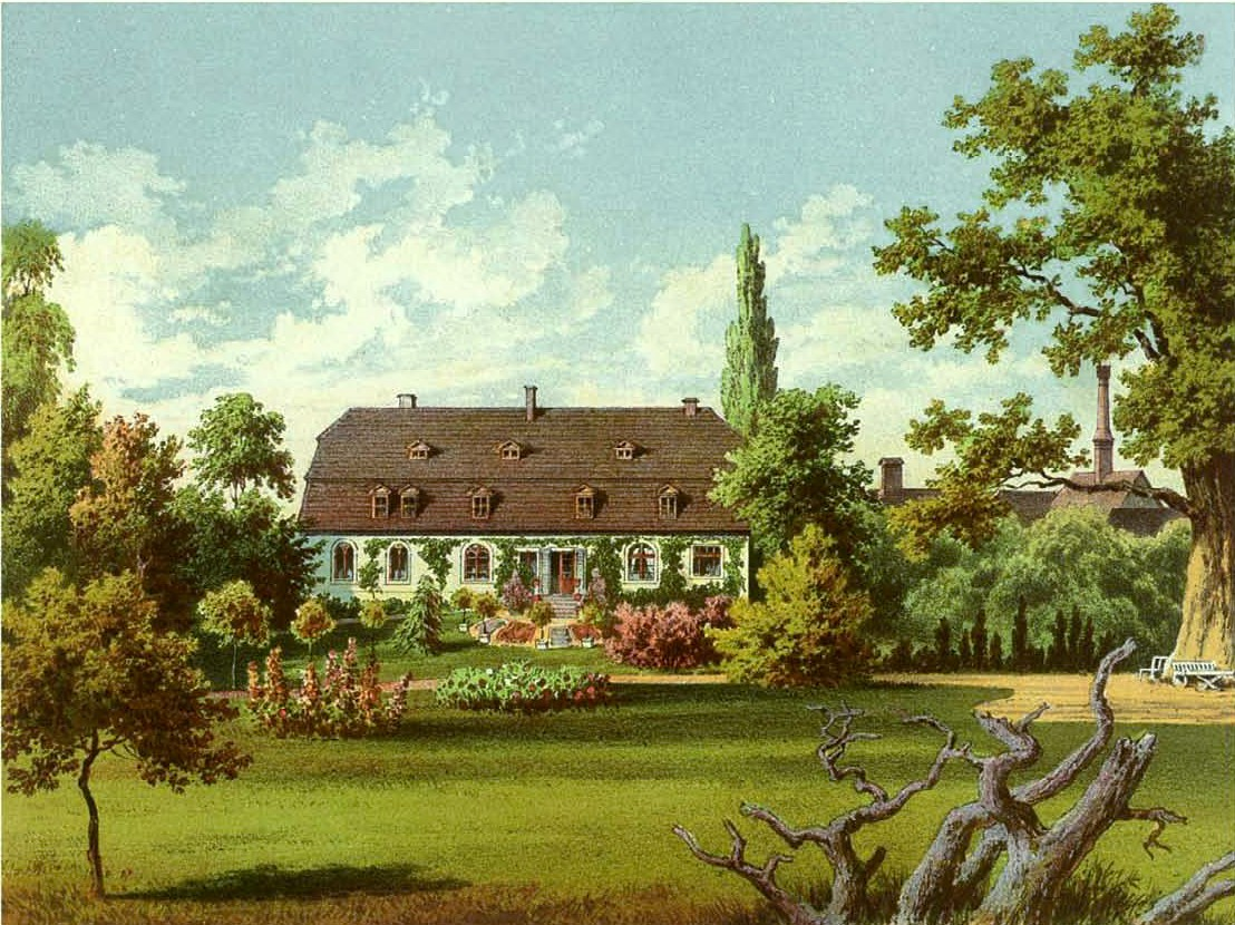 Rittergut Bremenhain, Kreis Rothenburg